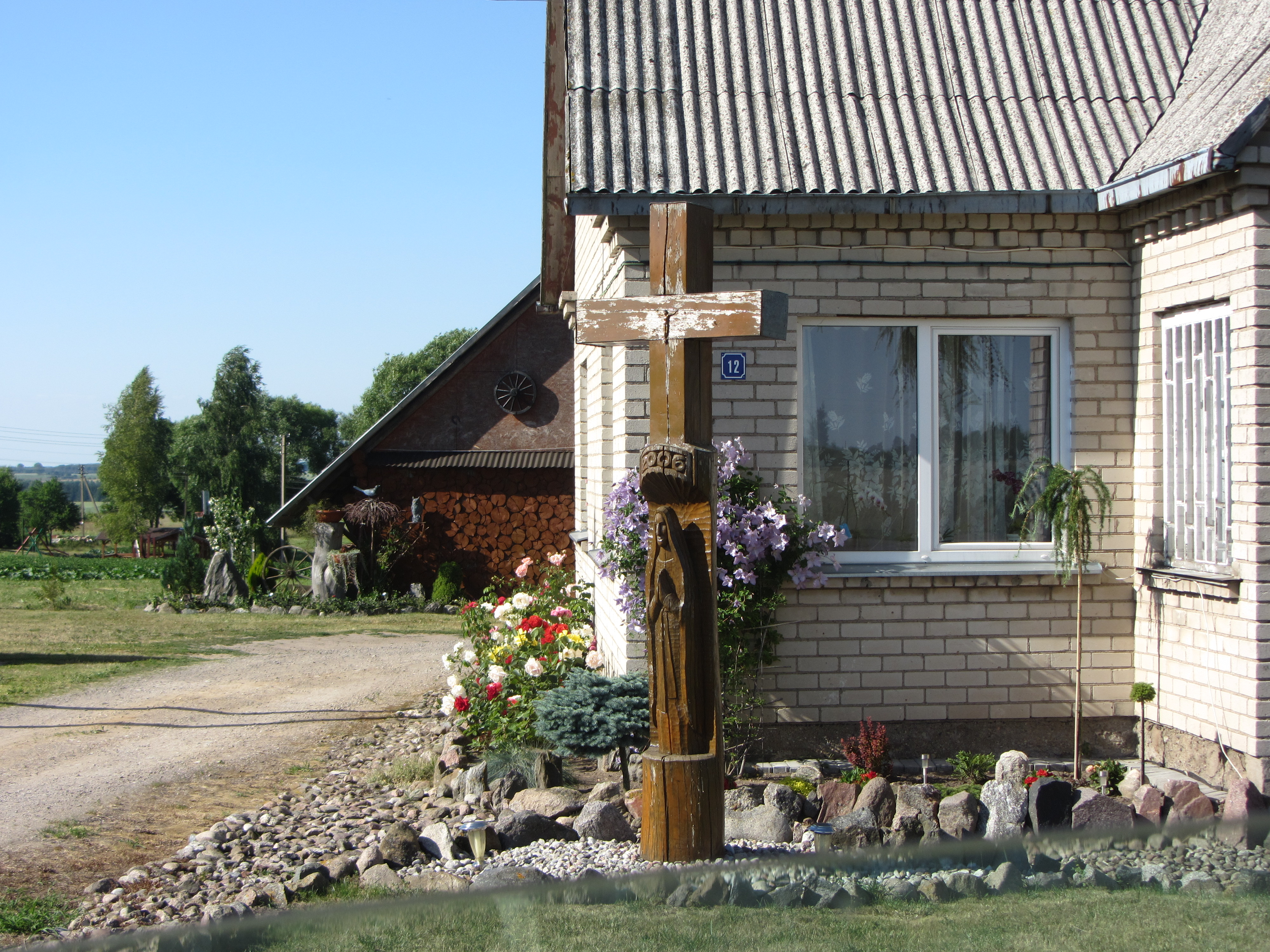 Kruonio sen., Lithuania